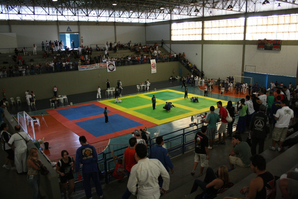 XII Copa Leão Dourado de Jiu-Jitsu, realizada no ginásio da Associação Atlética Banco do Brasil.